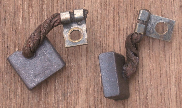 zelfgemaakte foto van koolborstels